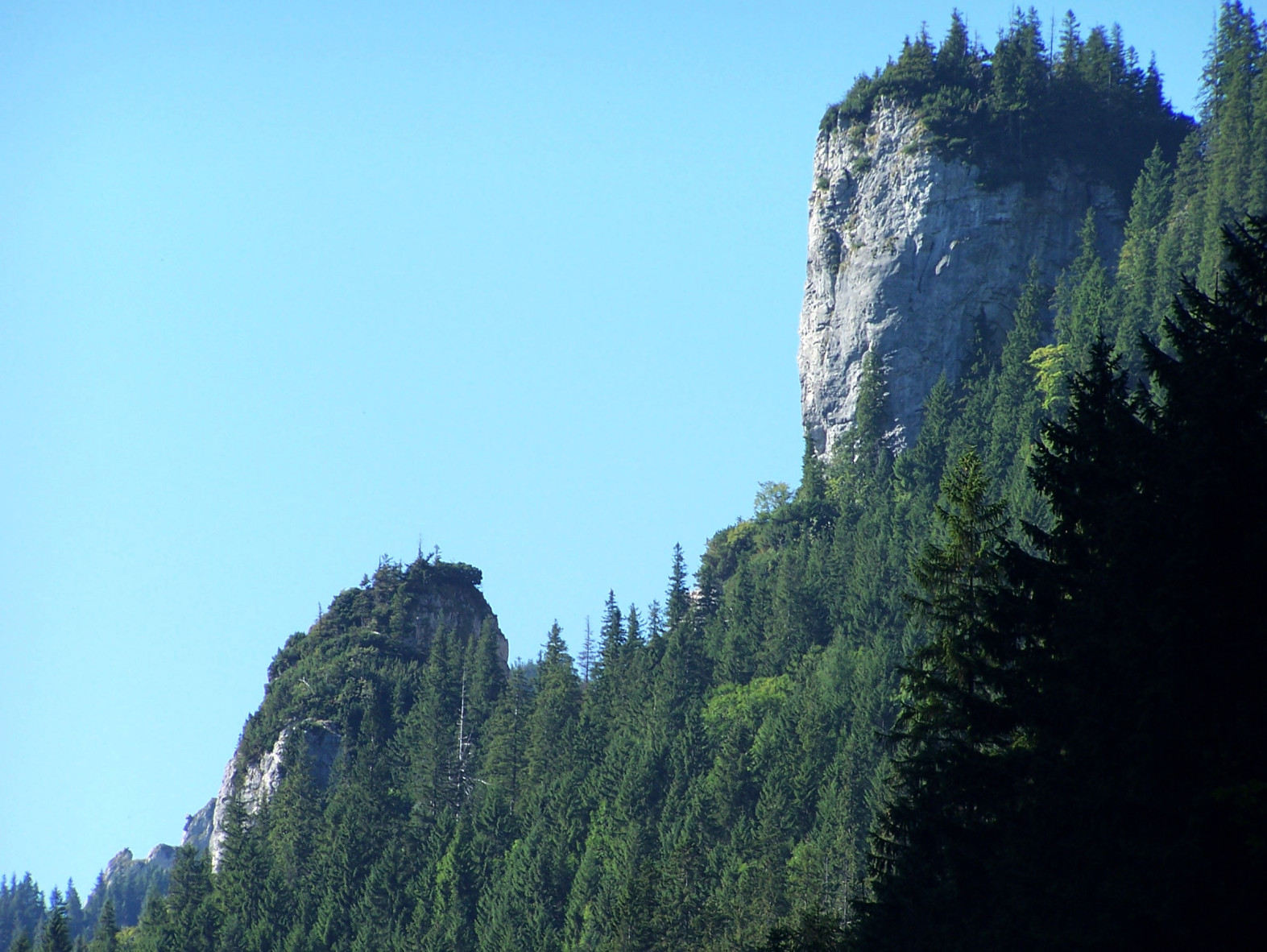 Kazalnica (Tatra Mountains, Dolina Kościeliska)